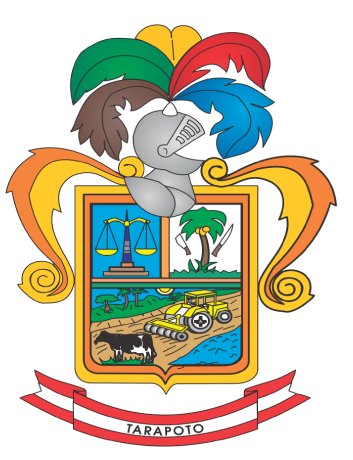 Escudo provincial de San Martín